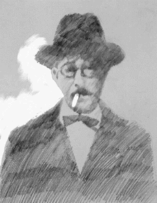 Fernando Pessoa, a Portuguese poet, drawed.